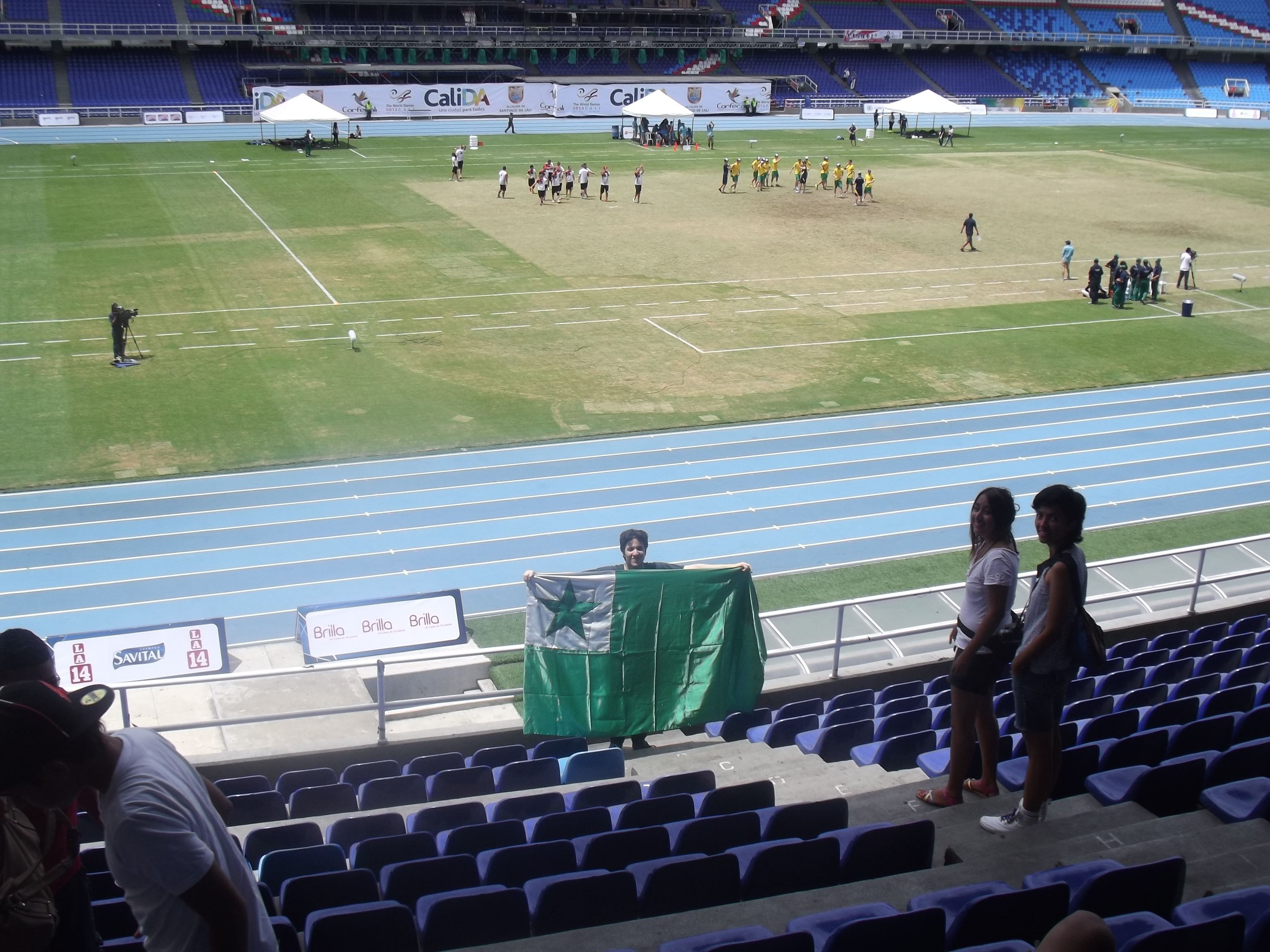 Ultimate en los Juegos Mundiales Cali 2013 en el Estadio Olímpico Pascual Guerrero